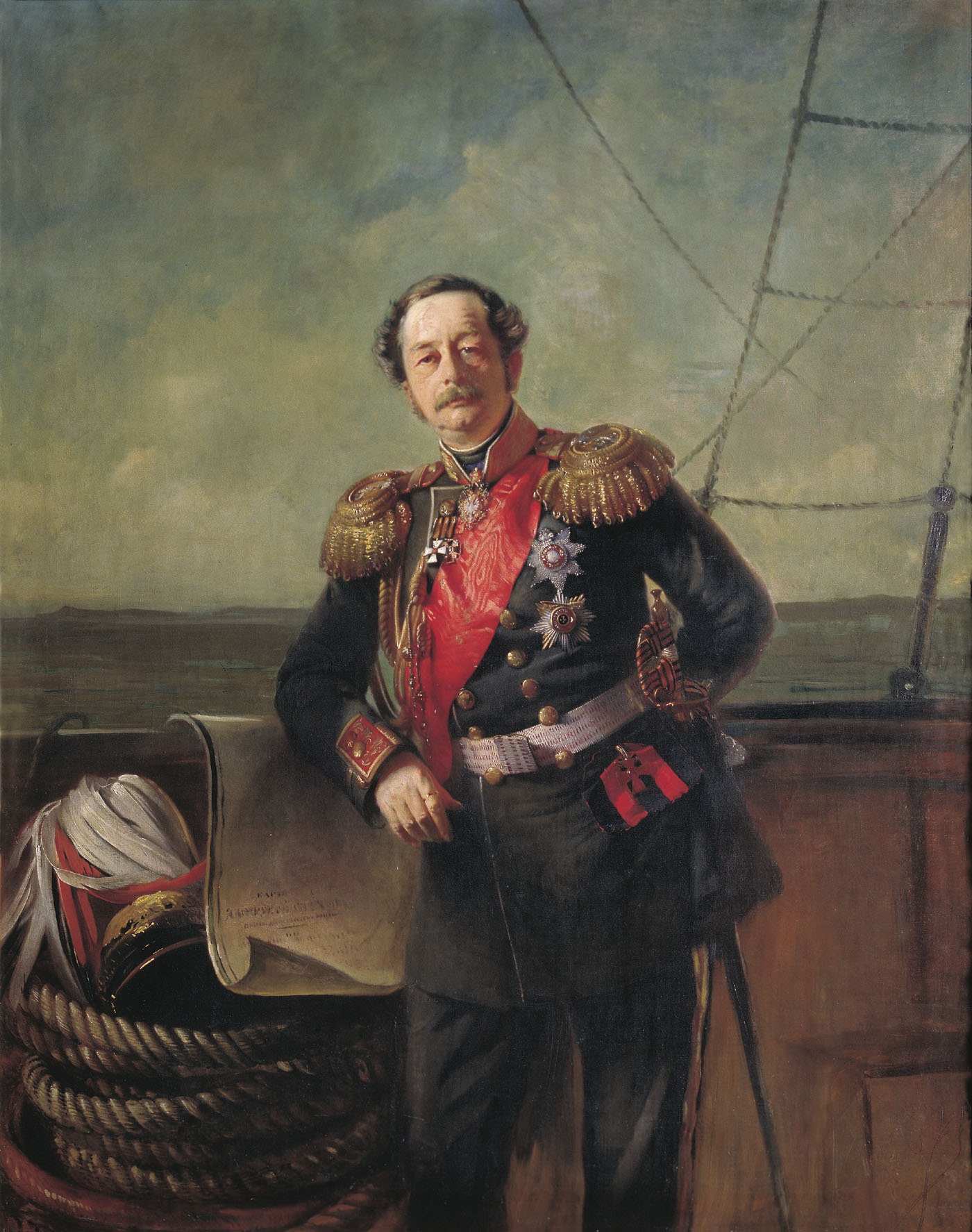 Константин Егорович Маковский - Портрет графа Николая Николаевича Муравьева-Амурского, генерал-губернатора Восточной Сибири. 1863. Холст, масло. 177х137. Иркутский областной художественный музей им. В.П.Сукачева